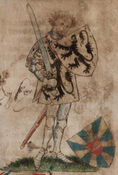 Pentekening uit het Comburger Handschrift – Cod.poet.et phil.fol.22 – fol. 282r. Voorstelling: Graaf Filips van de Elzas die het oude Vlaamse wapen opgaf voor het wapen met de zwarte leeuw dat hij had veroverd op de Saracenen (zoals beschreven in de Rijmkroniek van Vlaanderen, vs. 4983-4989, verderop in het Comburger Handschrift)